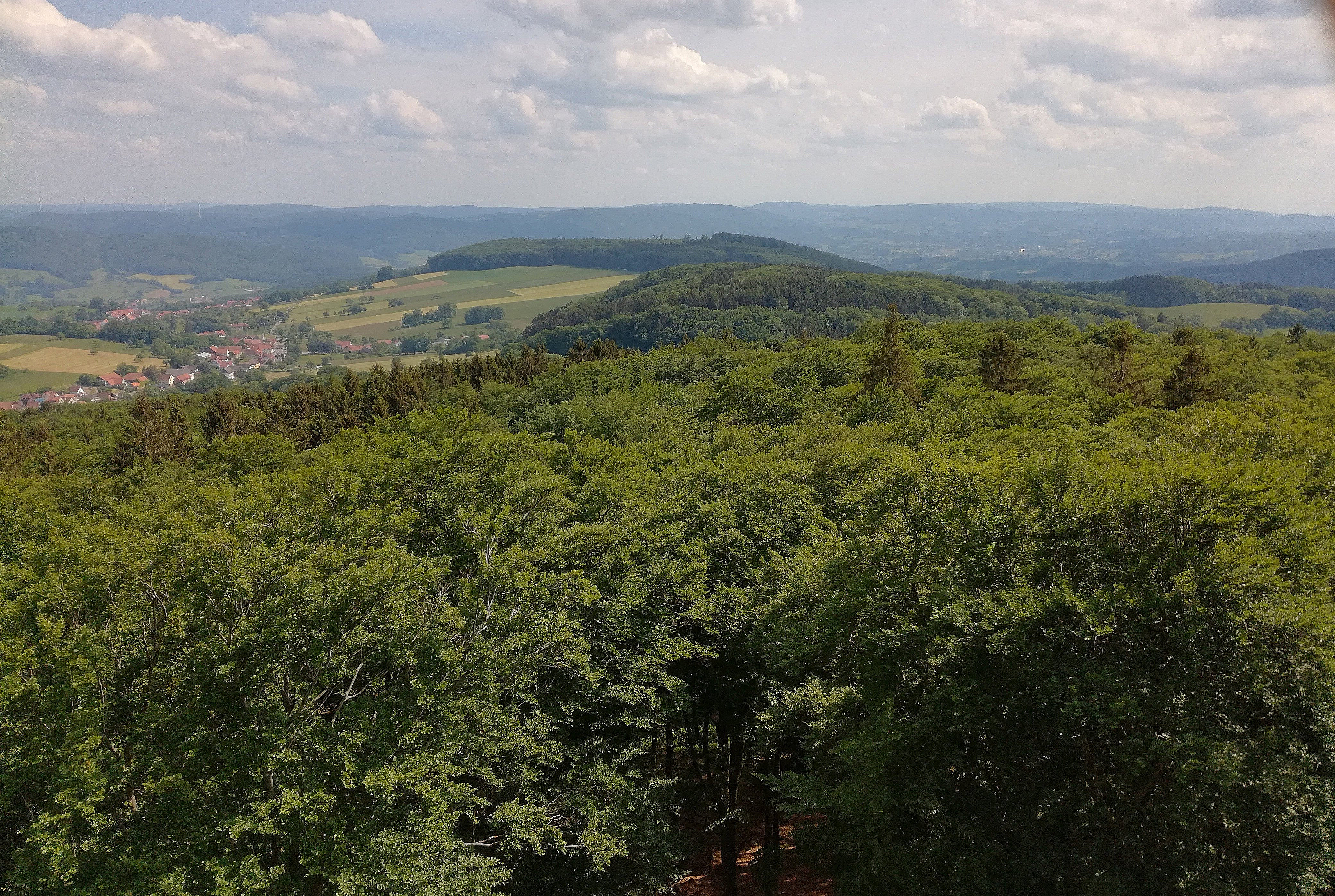 Neunkircher Höhe: Blick vom Kaiserturm nach Südsüdosten über Raupenstein und Das Buch, im Hintergrund die Tromm (Mitte rechts); Mai 2018